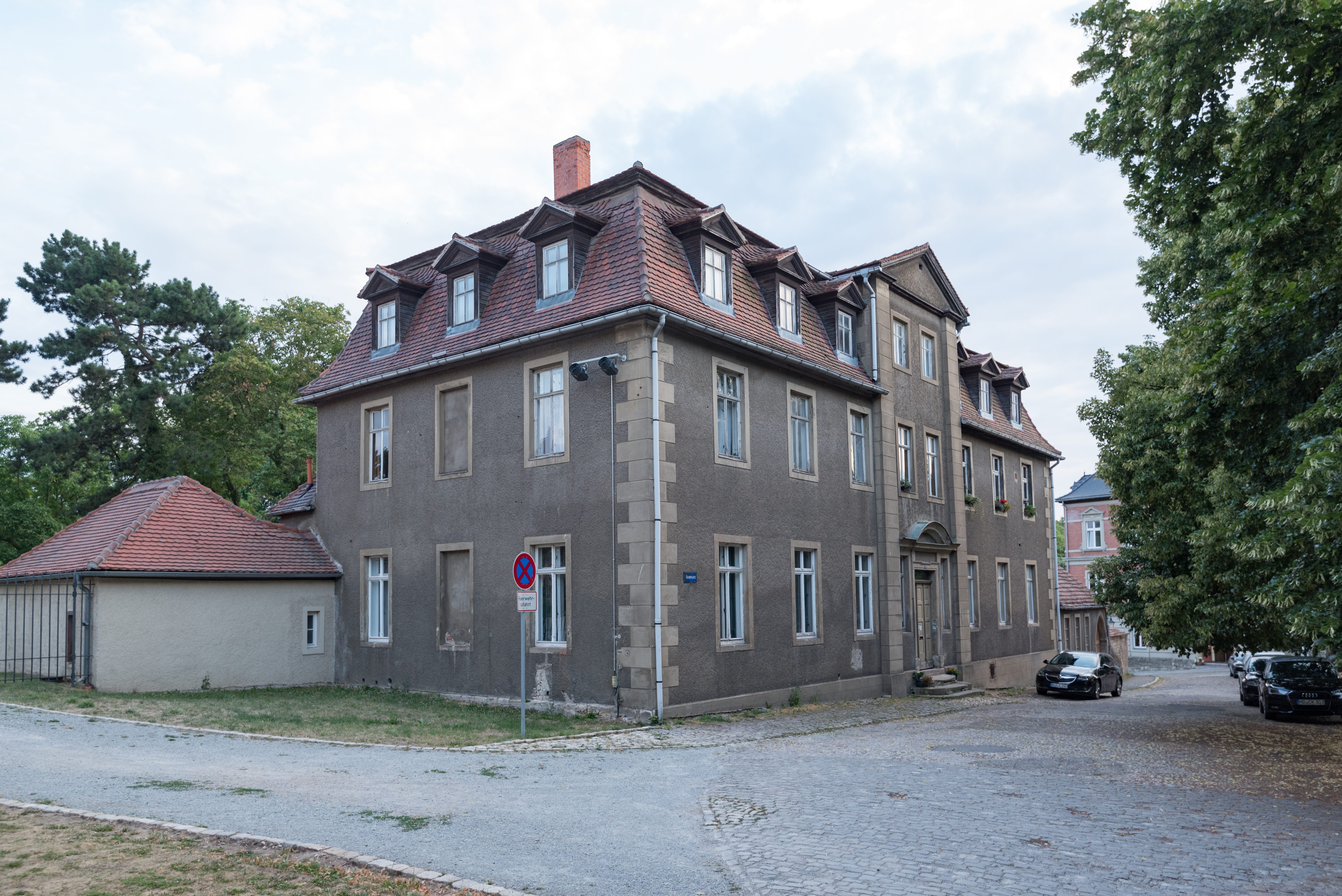 Naumburg (Saale), Domplatz 14